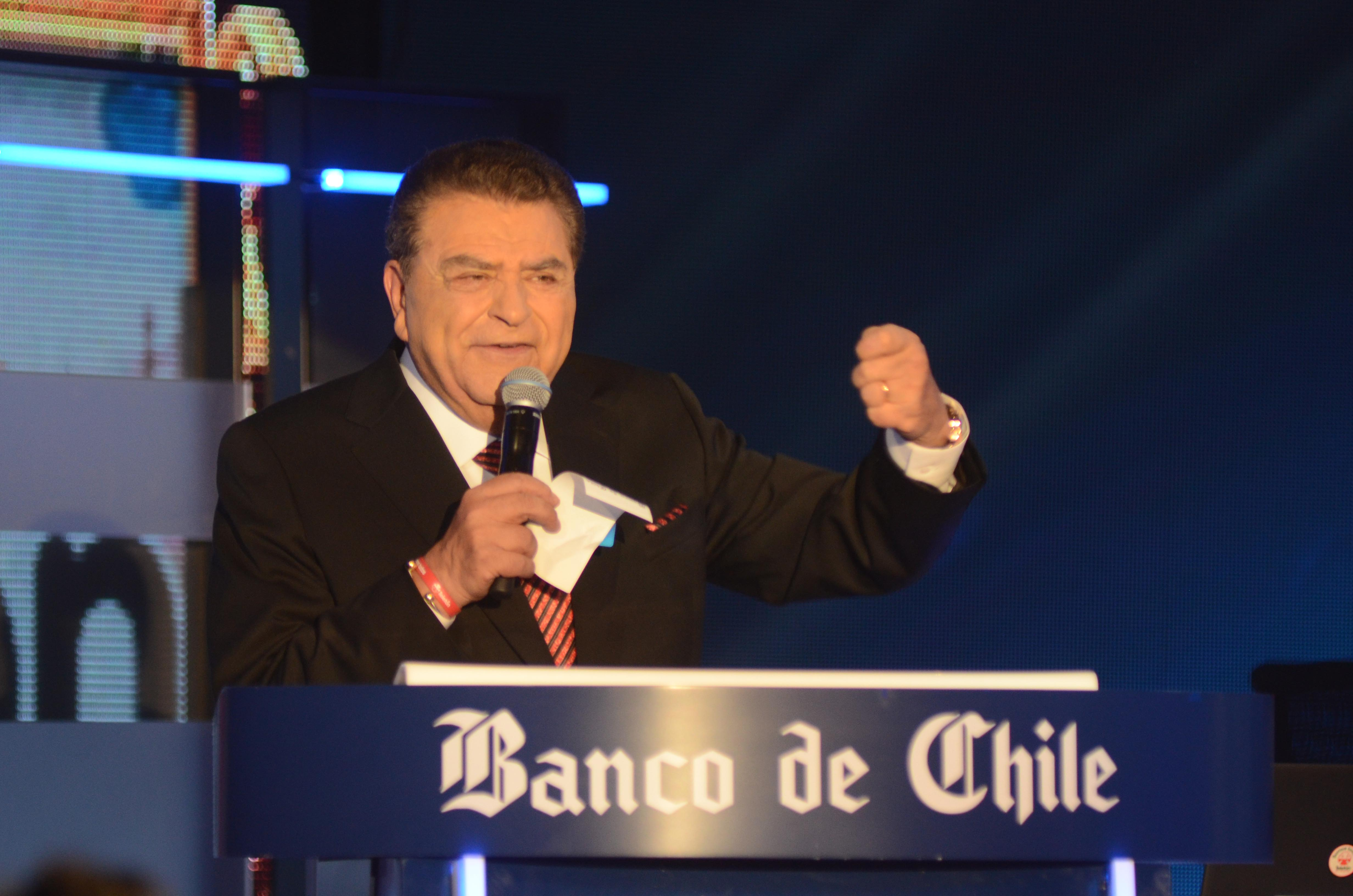 Ministro Elizalde asiste a la Ceremonia Inaugural de la Teletón